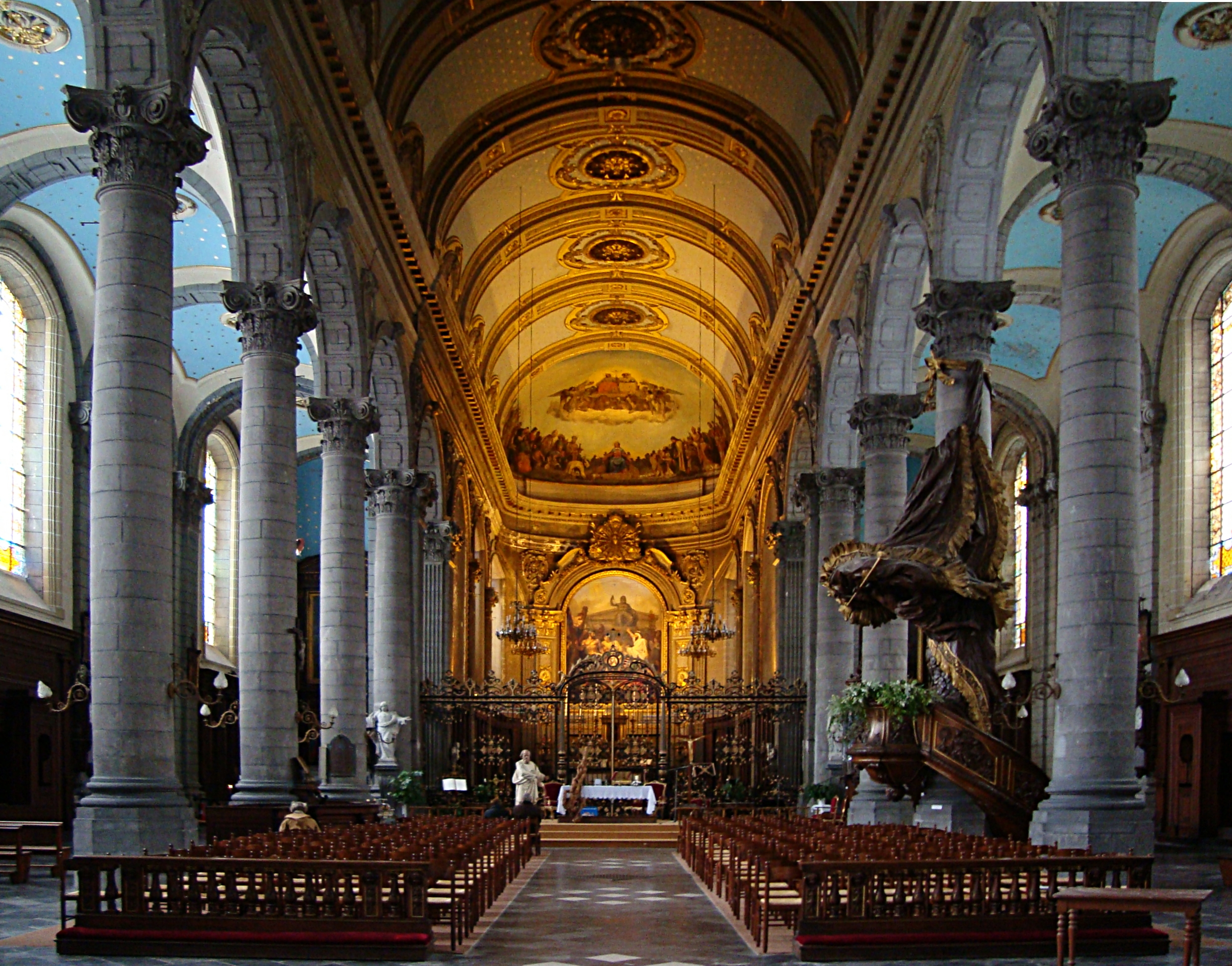 L'intérieur de l'église Saint-André à Lille (Nord). Commencés en 1701, les travaux dureront pendant plus d’un demi-siècle : le choeur est achevé en 1755 et l'église consacrée en 1758.